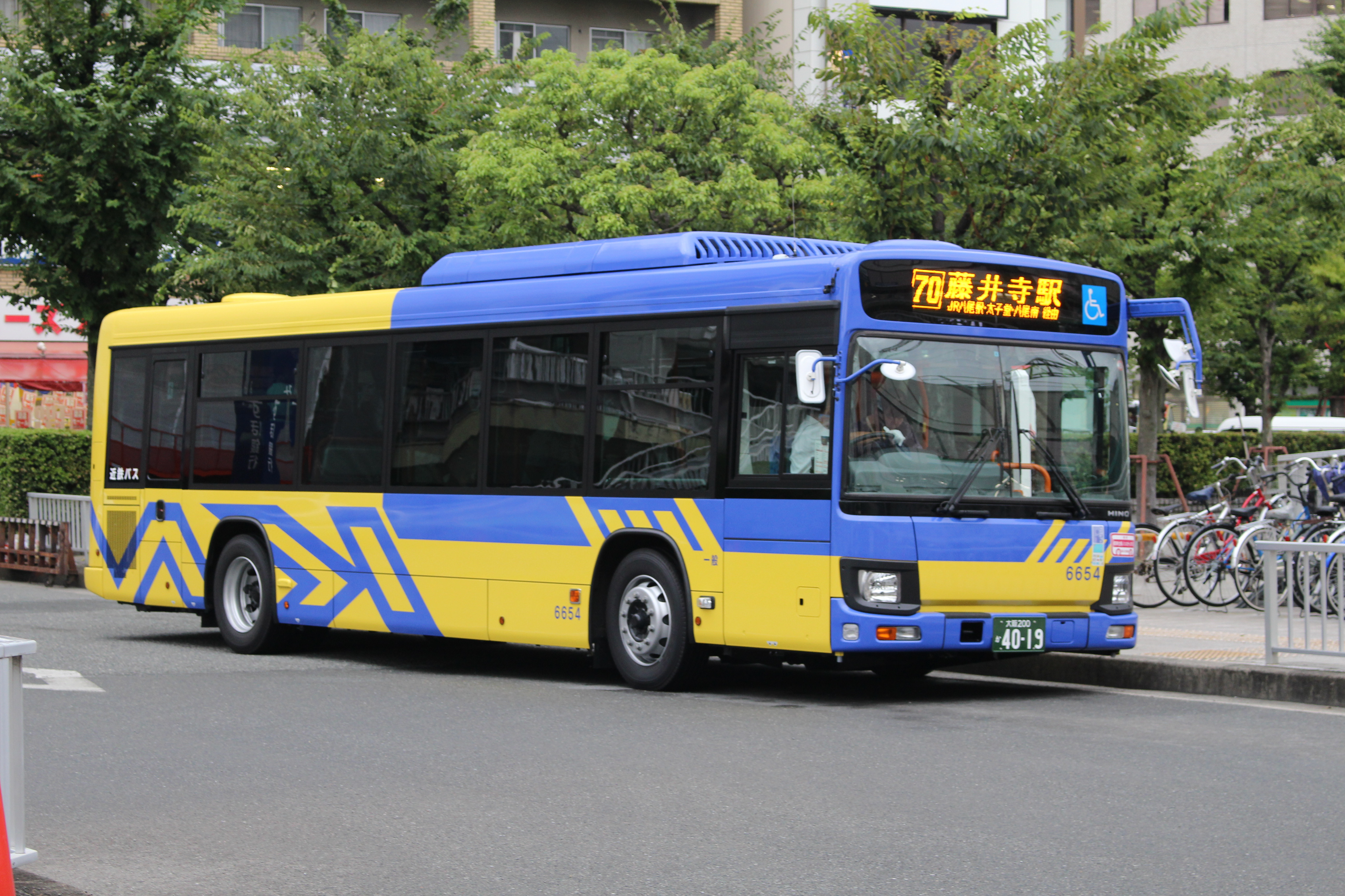 2015年フルモデルチェンジのブルーリボン。八尾営業所には1台のみ（6654号）導入された。